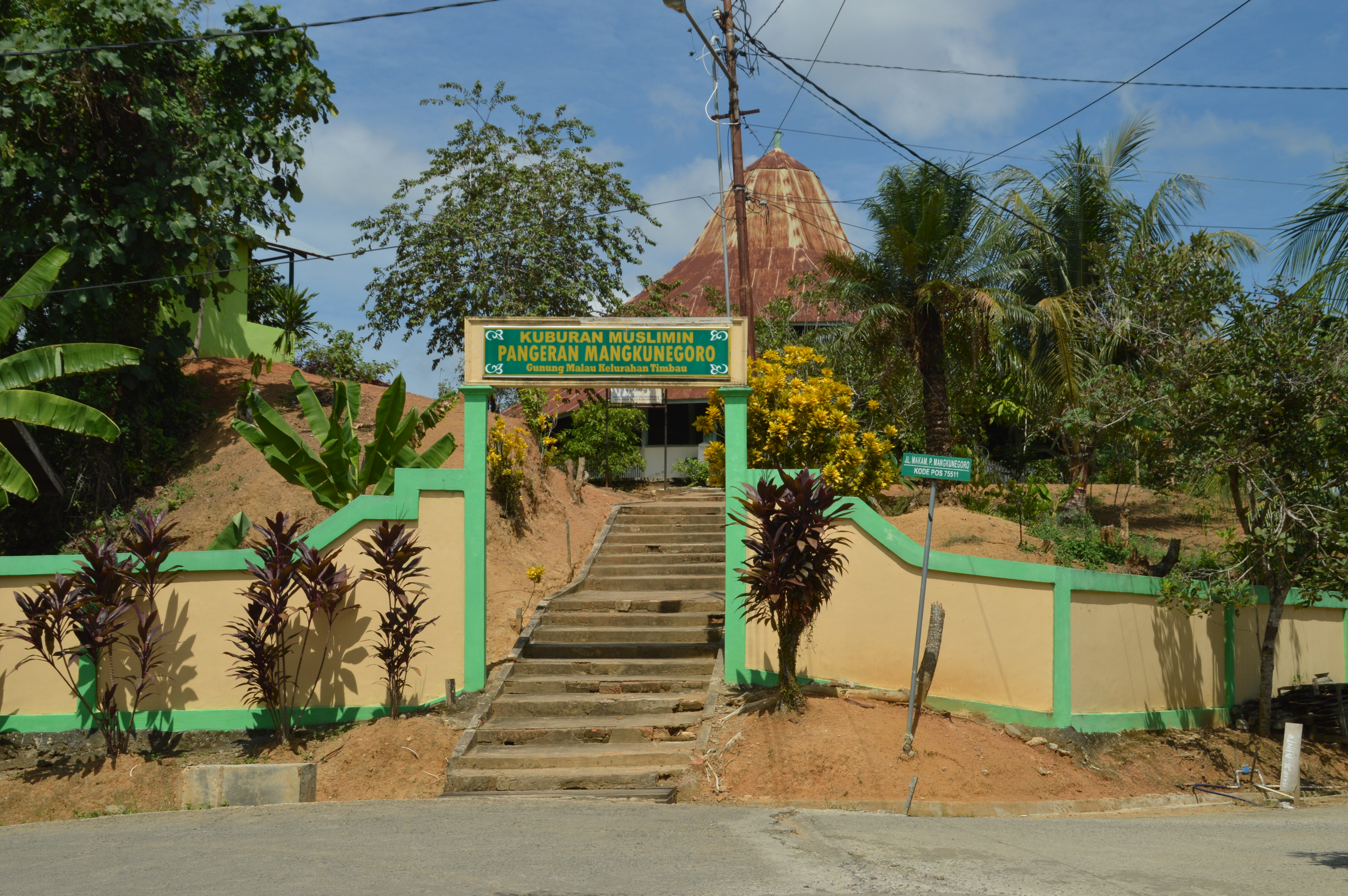 Kuburan Muslimin Pangeran Mangkunegoro di kawasan Gunung Malau, kota Tenggarong, Kabupaten Kutai Kartanegara.